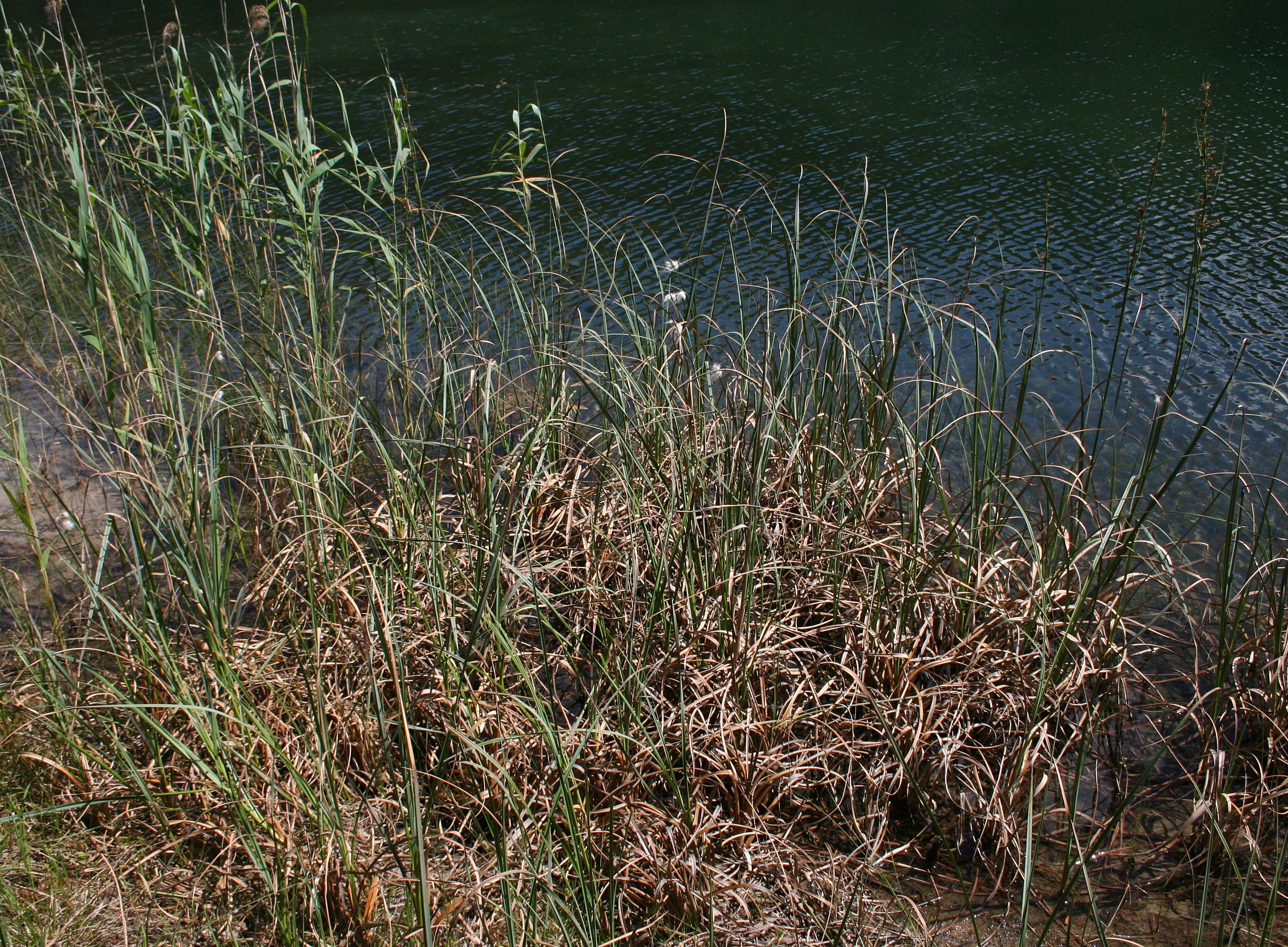 Zaborski Park Krajobrazowy, szuwar kłociowy - na pierwszym planie kłoć wiechowata